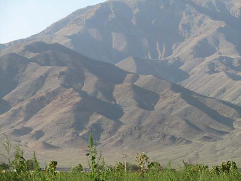 نمایی از مزرعه های قزقلعه